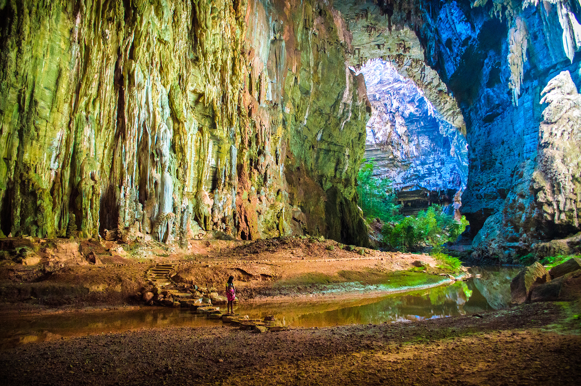 Parque Nacional Cavernas do Peruaçú/Minas Gerais